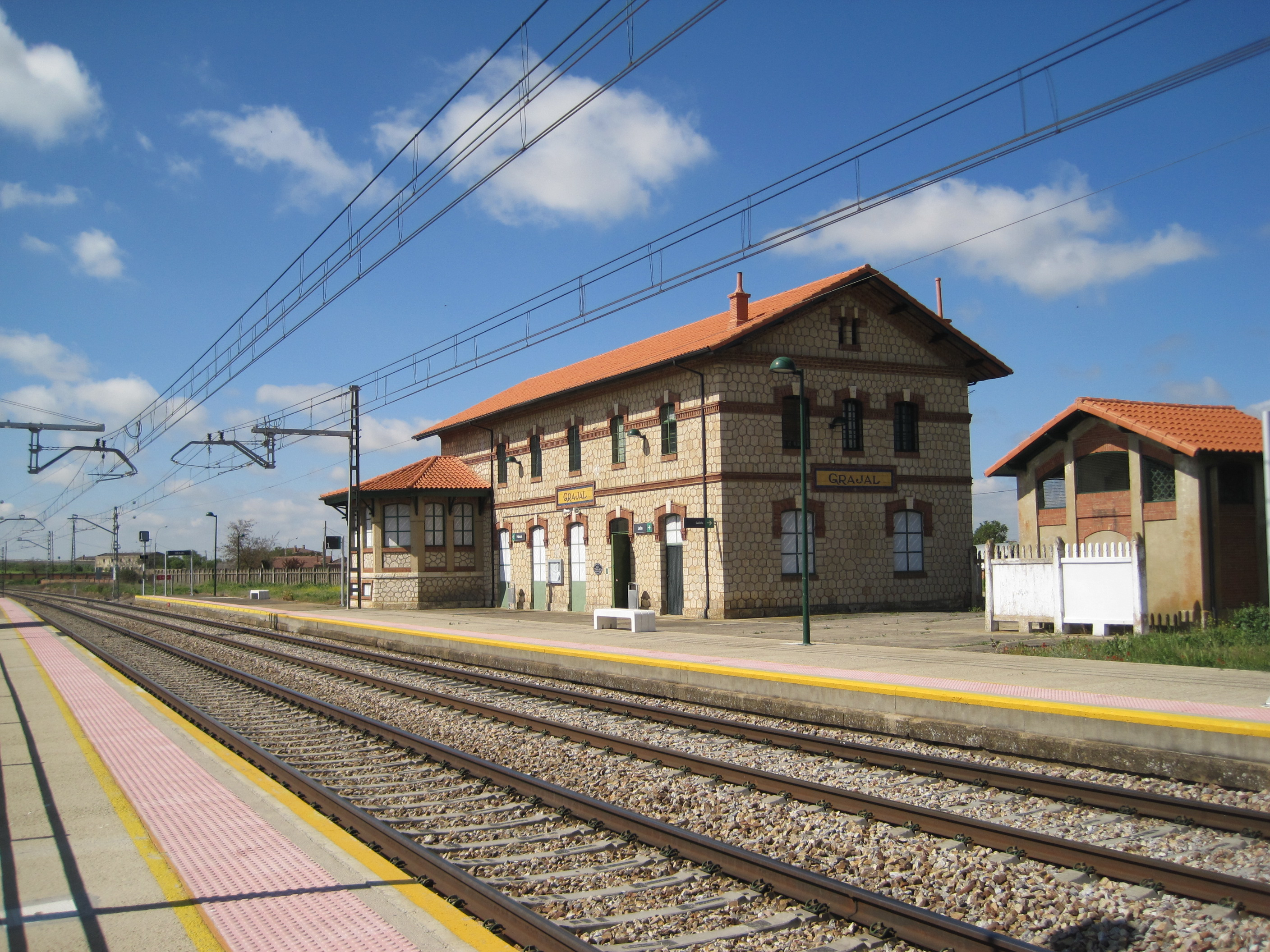 Estación ferroviaria de Grajal de Campos (León, España).